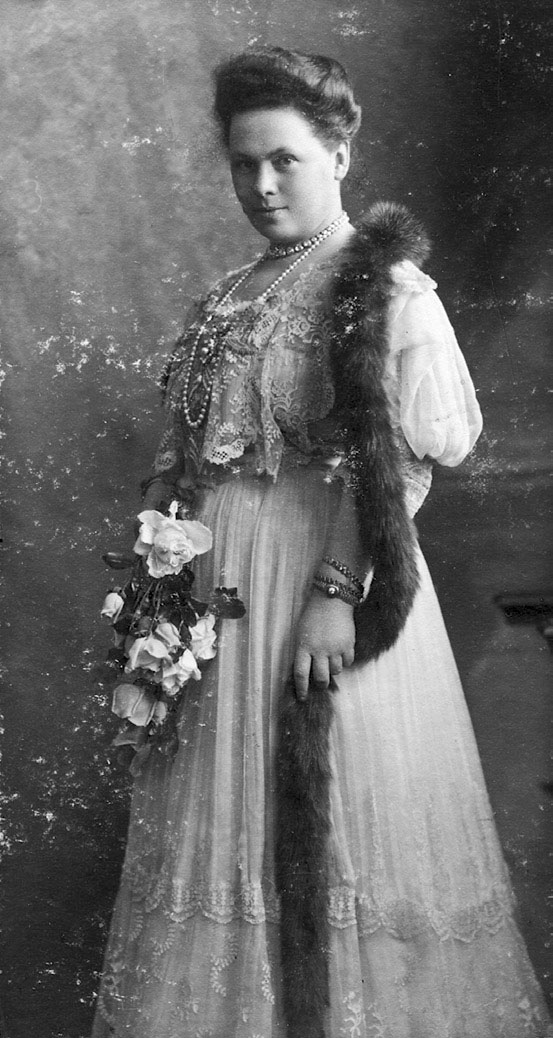 Наталья Фёдоровна Вонлярлярская, графиня Карлова (1858-1921) - морганатическая супруга герцога Георгия Георгиевича Мекленбург-Стрелицкого